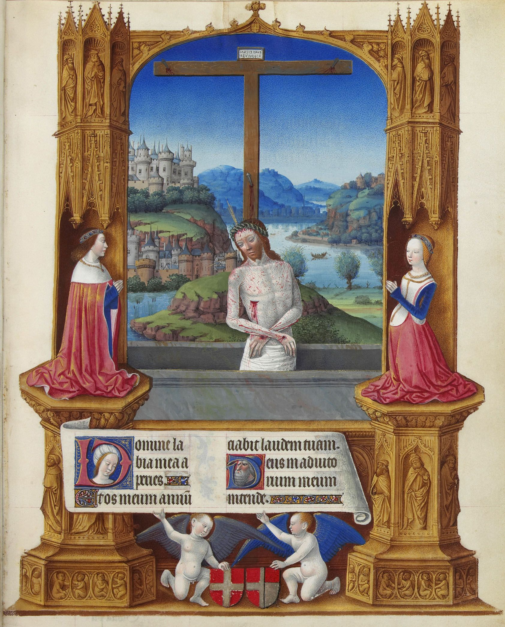 Le Christ aux stigmates devant sa croix et un paysage, entouré du duc Charles Ier de Savoie et de la duchesse de Savoie Blanche de Montferrat agenouillés